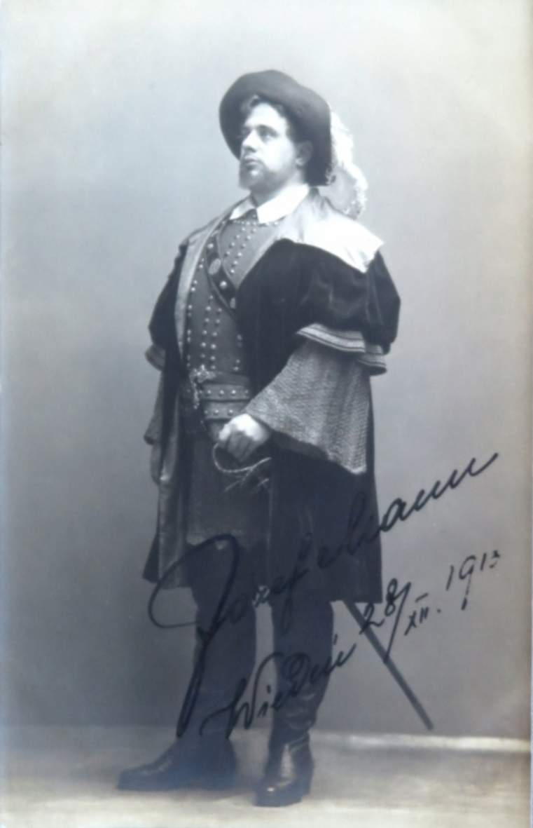 polski śpiewak operowy Józef Mann (1883–1821), zdjęcie z autografem o treści: Józef Mann / Wiedeń 28/XII. 1913; na rewersie nadruk: Ludwig Gutmann. Photographische Kunstanstalt, Wien, / IX., Währingerstraße 18 (1913) oraz pieczątka: JÓZEF MANN / Wiedeń, IX. Nussdorferstrasse 4.